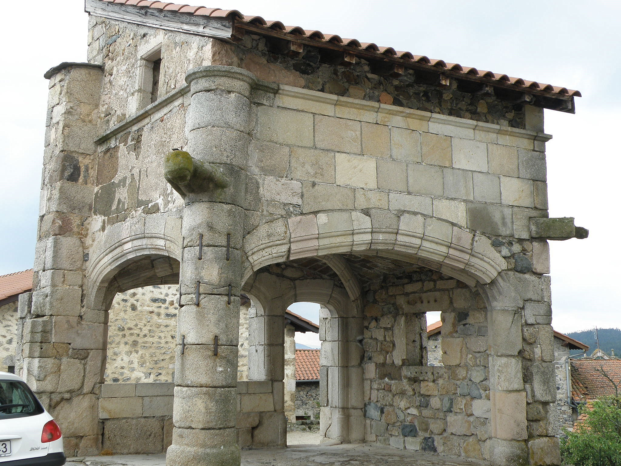 Roche-en-Régnier, comm. de la Haute-Loire, France (Auvergne). Porche de la prévôté, dans le bourg médiéval.